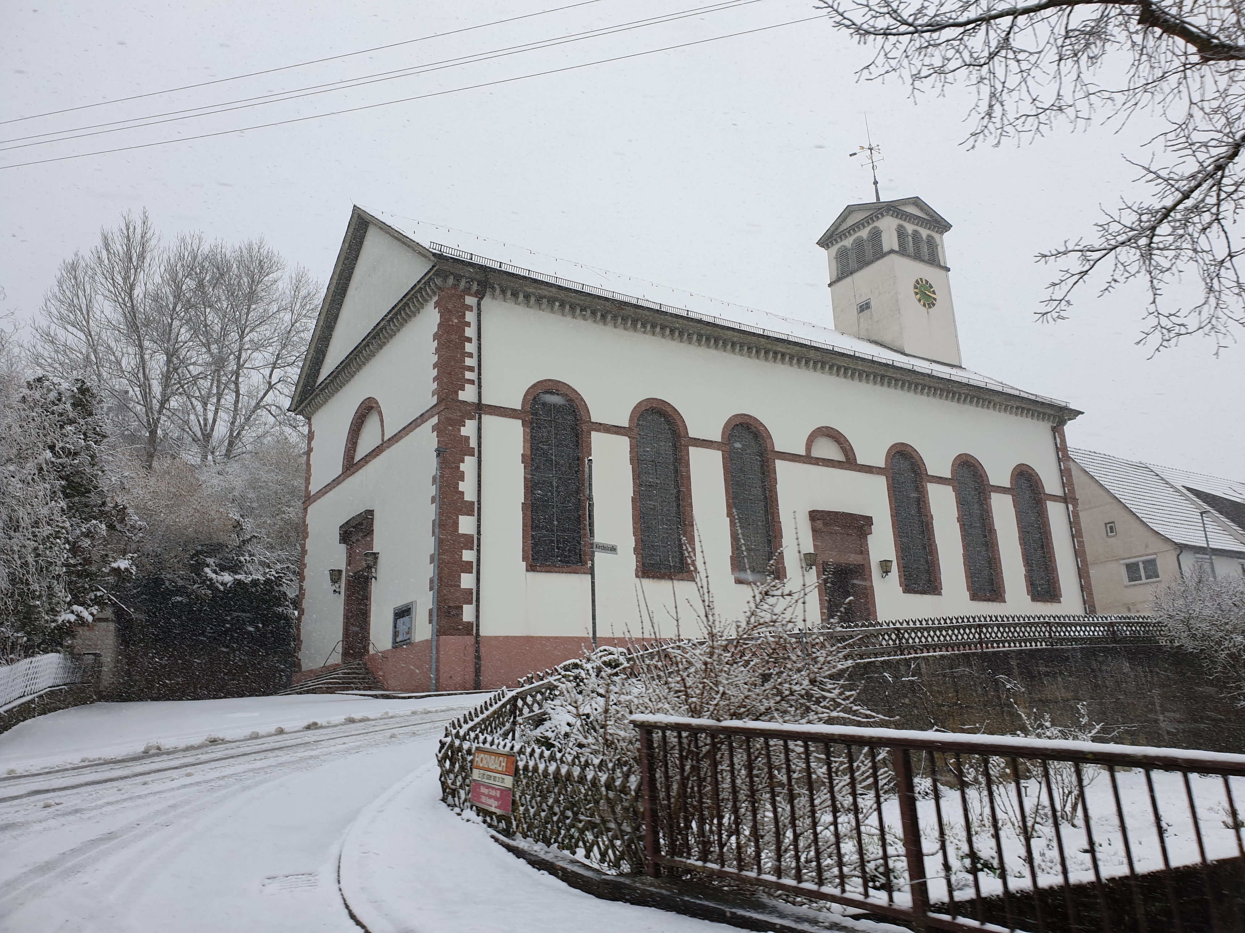 Leonhardskirche Dätzingen von Süden